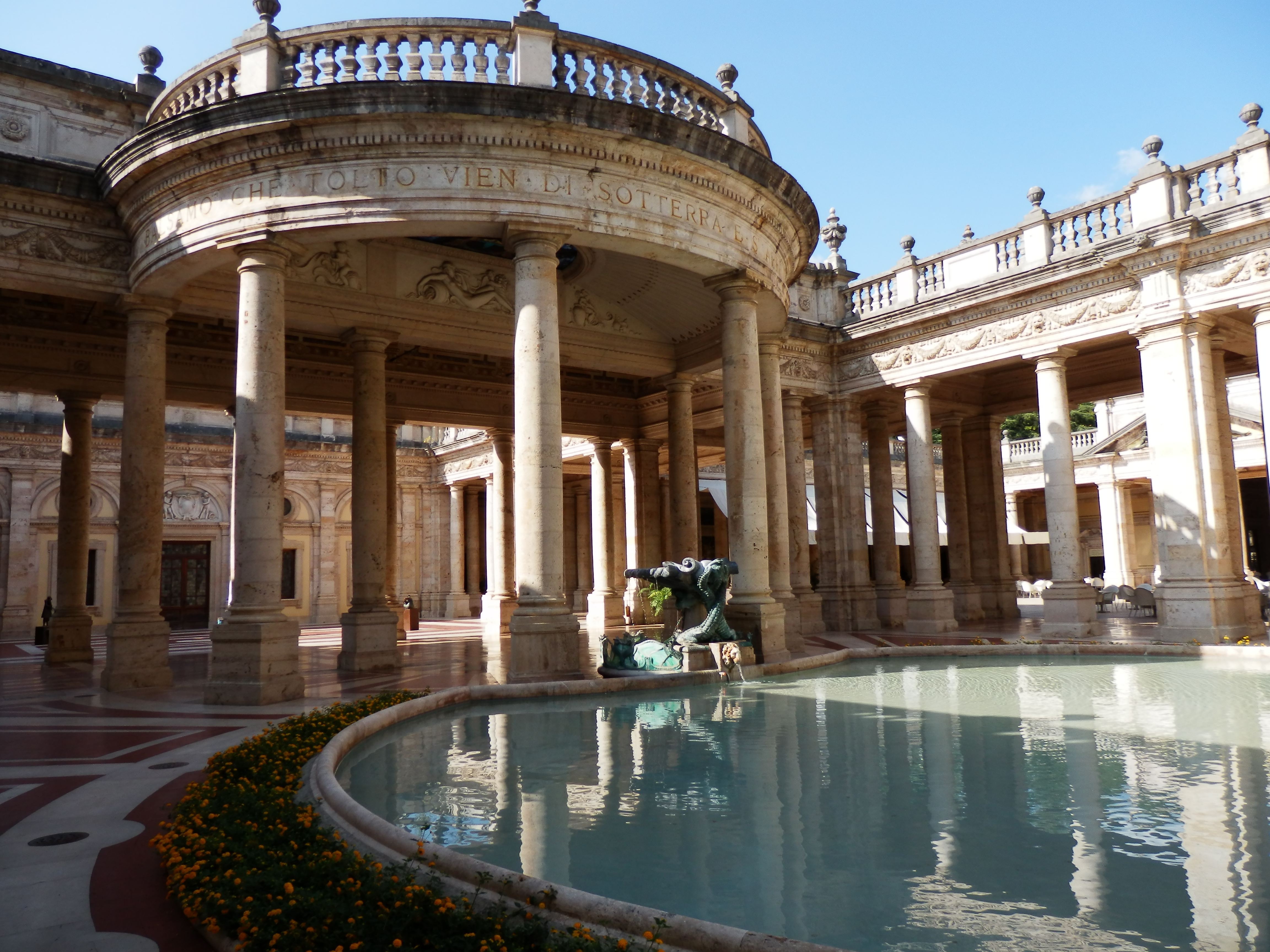 Terme Tettuccio, tempio termale This is a photo of a monument which is part of cultural heritage of Italy.